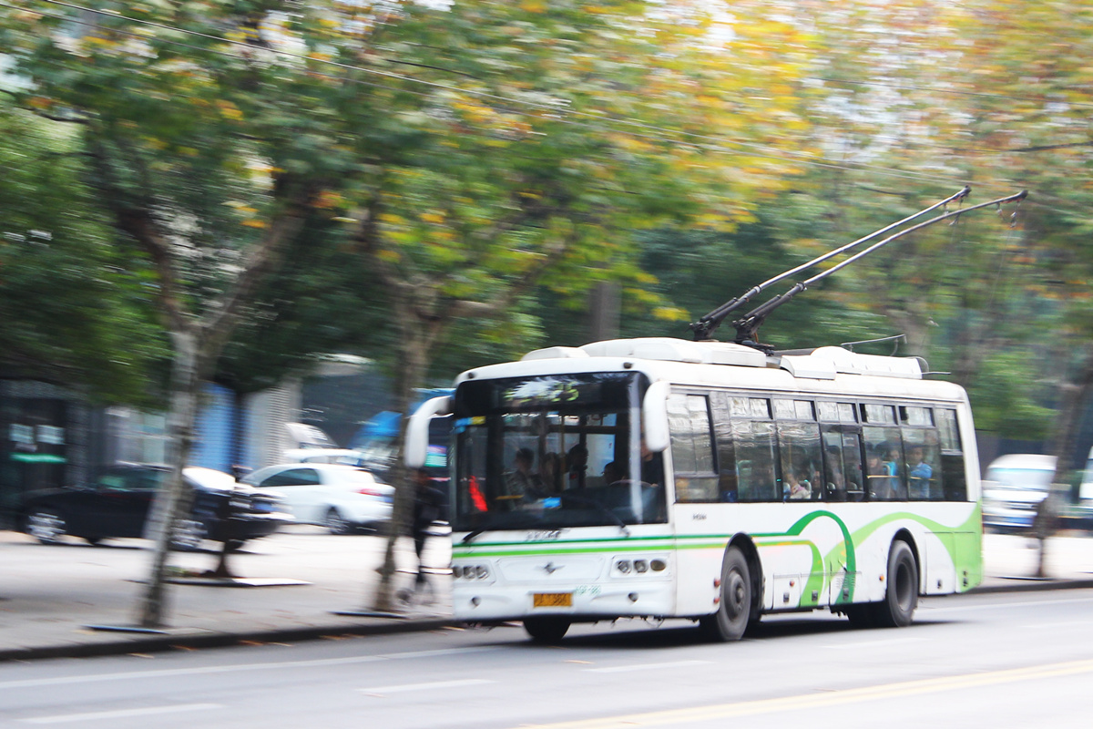 中文（中国大陆）: 25路无轨电车